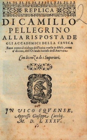 Replica di Camillo Pellegrino alla risposta degli Accademici della Crusca fatta contro il dialogo dell'epica poesia, come e' dicono, dell'Orlando furioso dell'Ariosto. In Vico Equense, appresso Gioseppe Cacchij, MDLXXXV